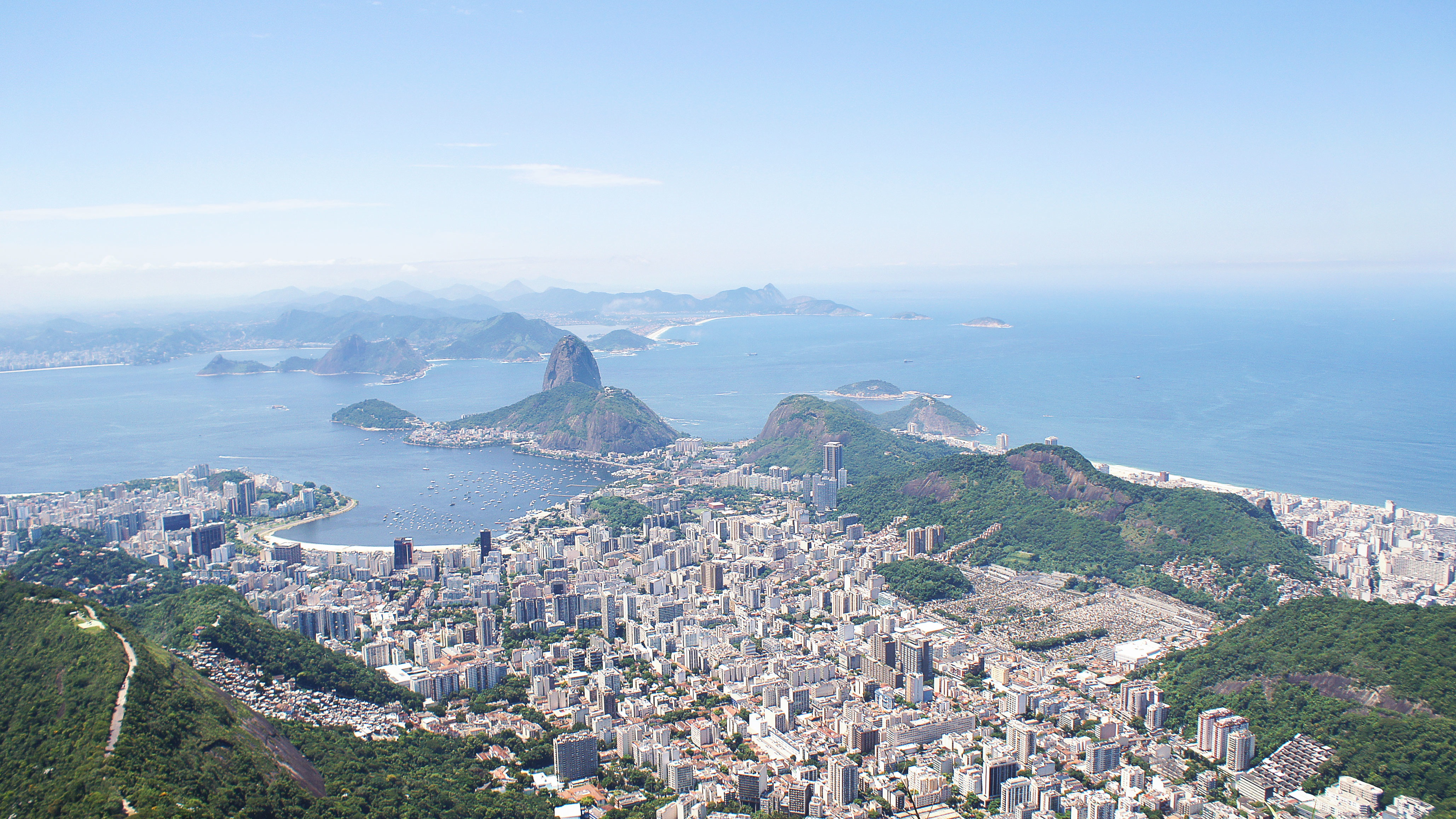 Vista a partir do Cristo Redentor, no Rio de Janeiro